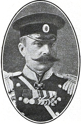 Хольмсен, Иван Алексеевич